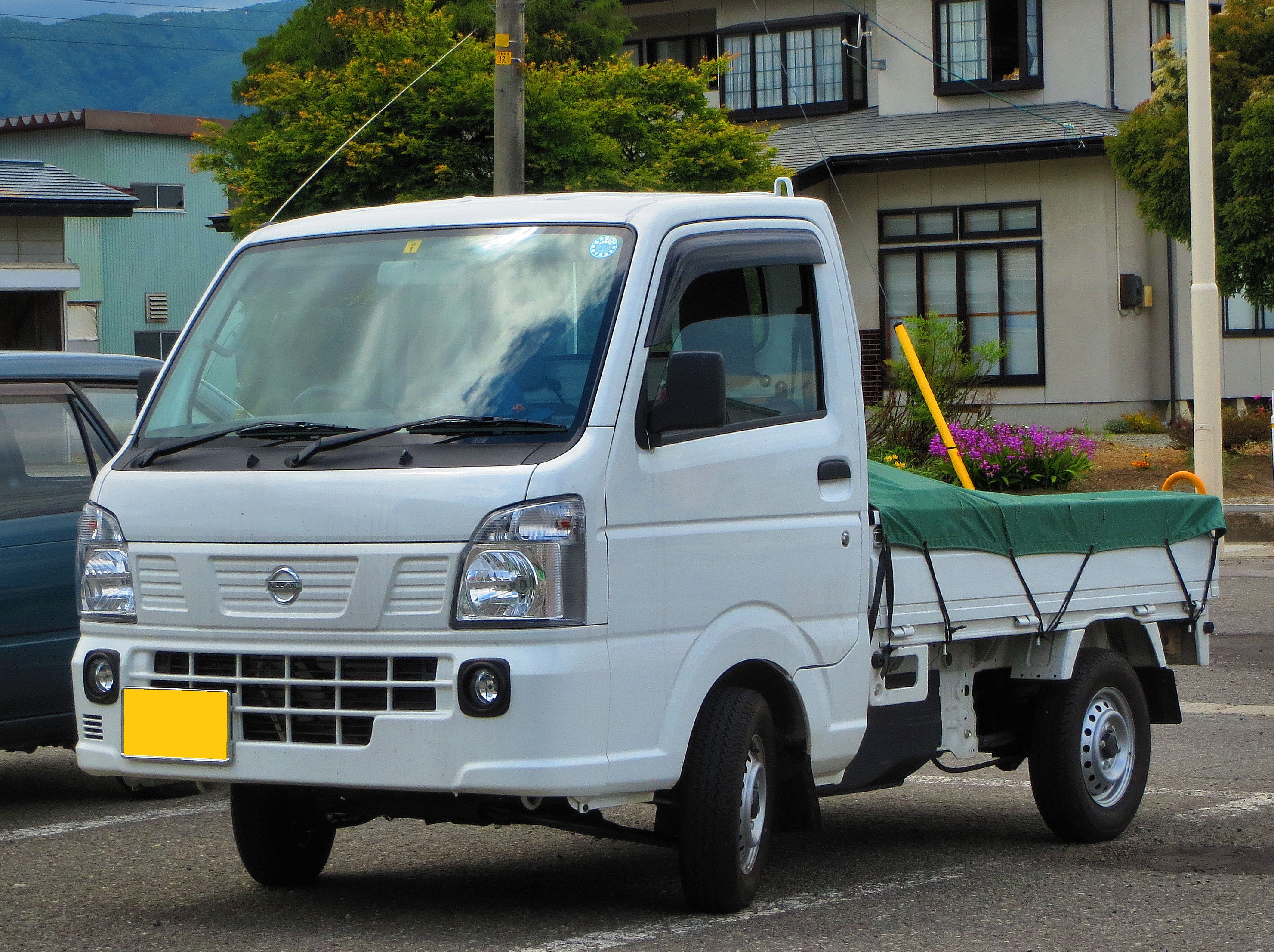 日産 NT100クリッパーDX 4WD